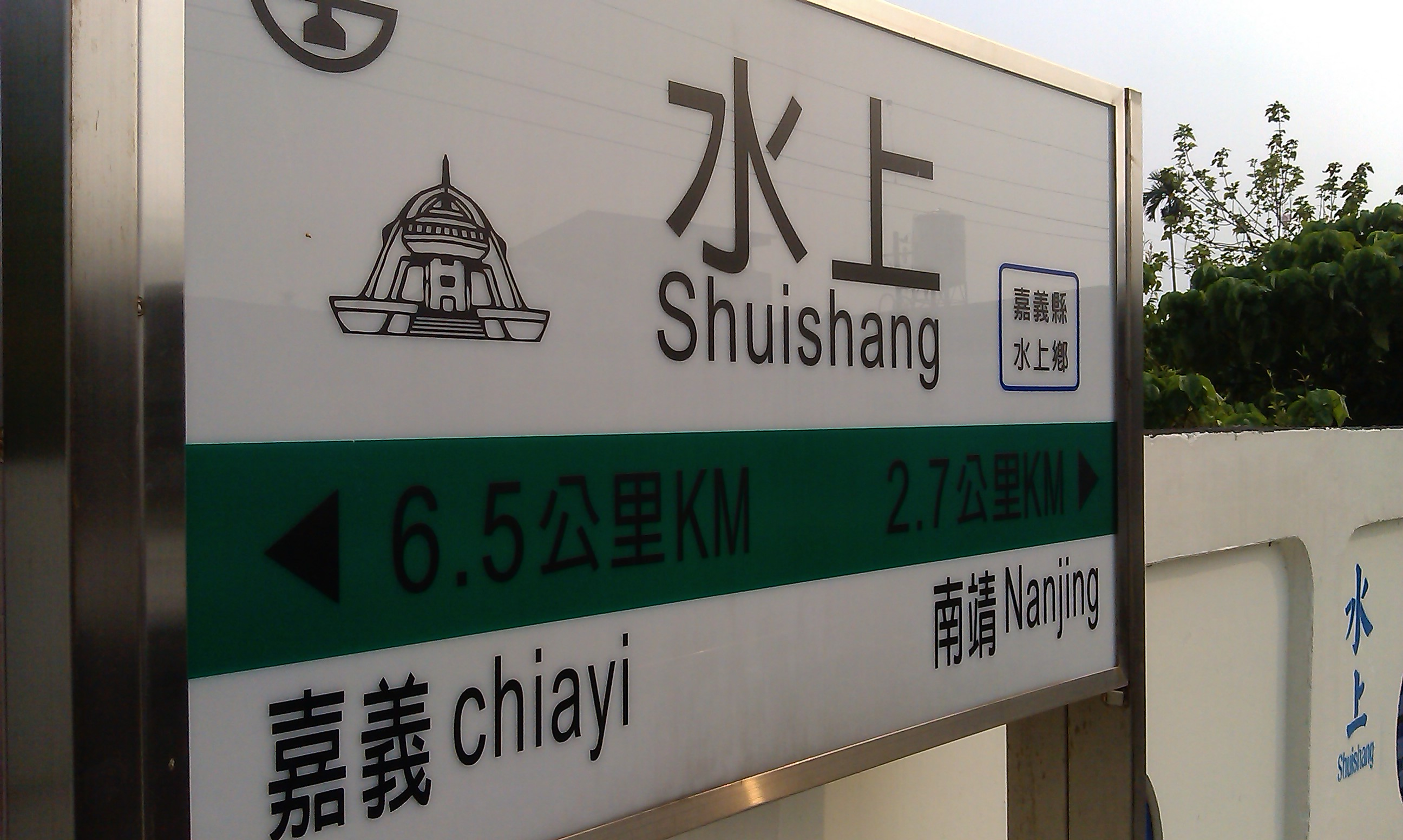 嘉義縣水上鄉 水上火車站